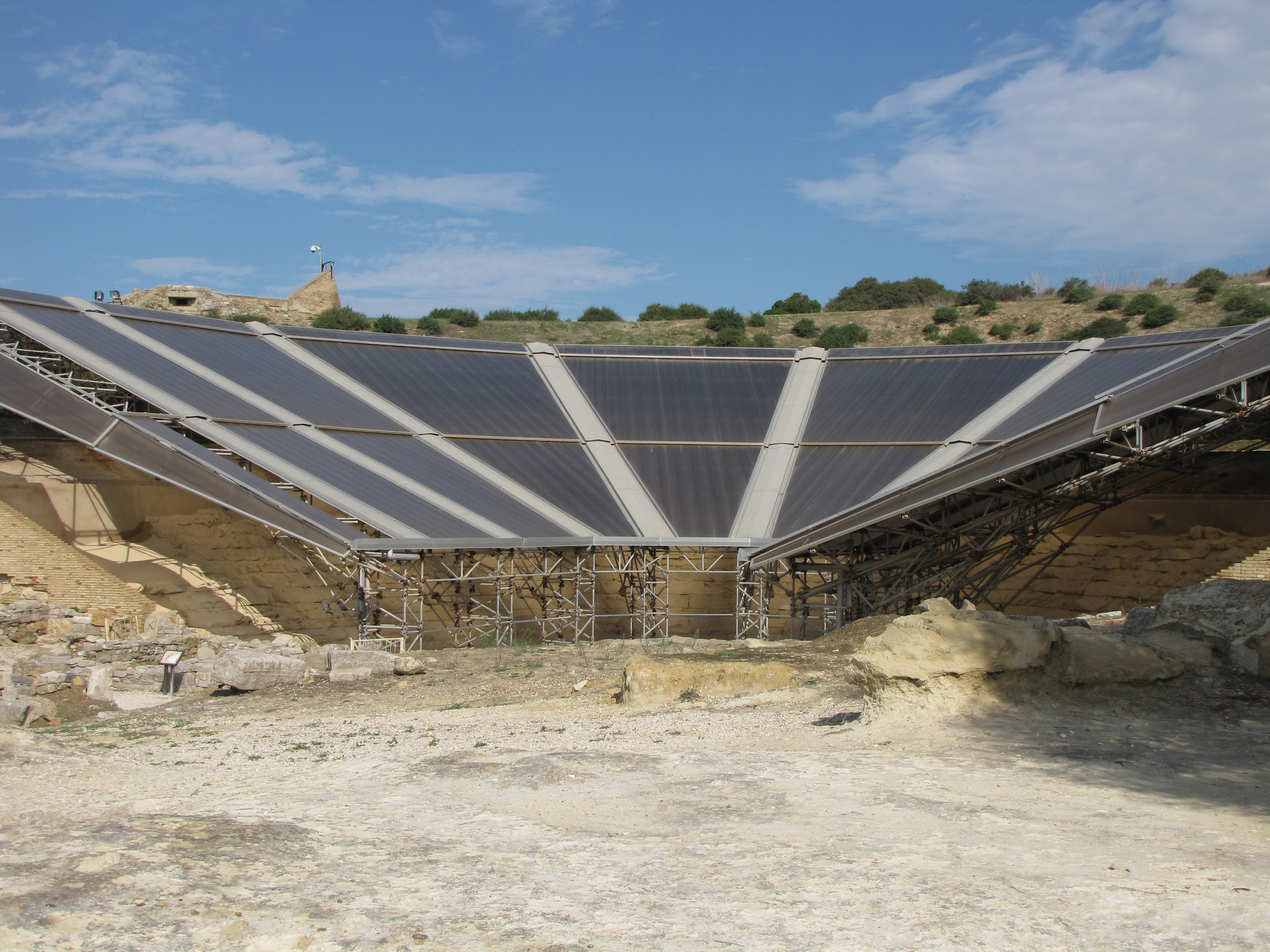 Teatro Greco-Eraclea Minoa